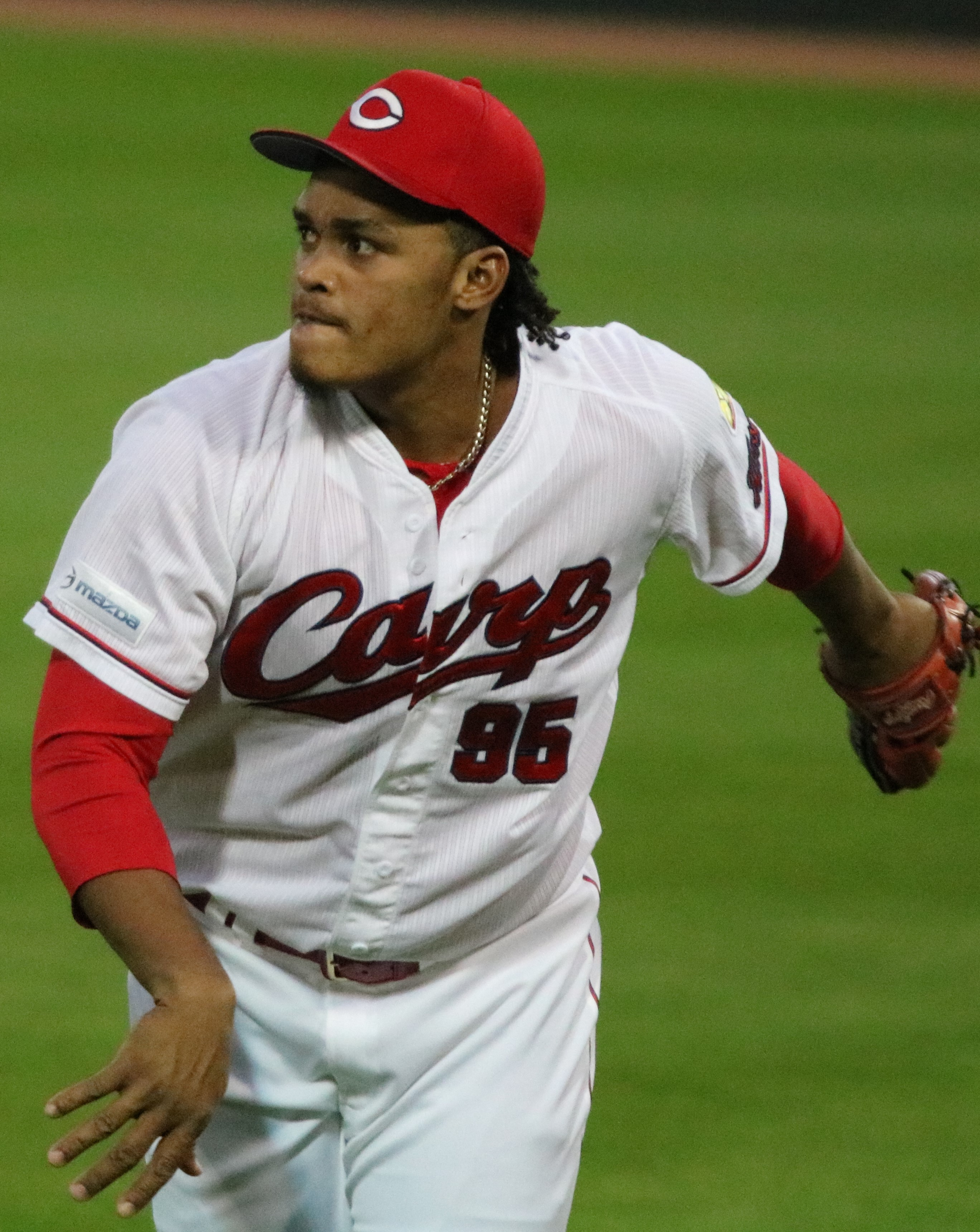 2017年10月24日マツダスタジアム